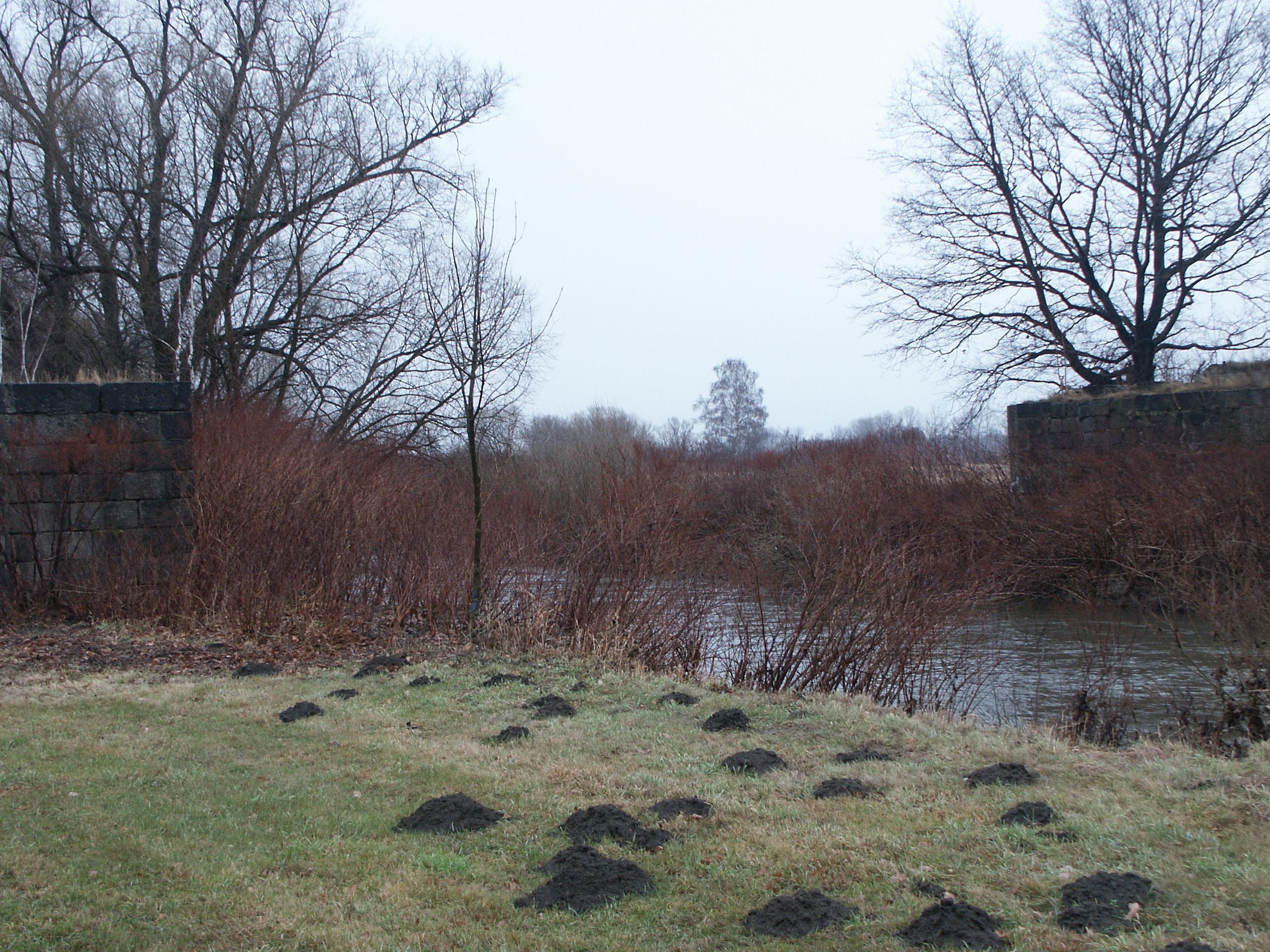 Railway bridge over Lusatian Neisse between Hagenwerder and Zawidow (2007)